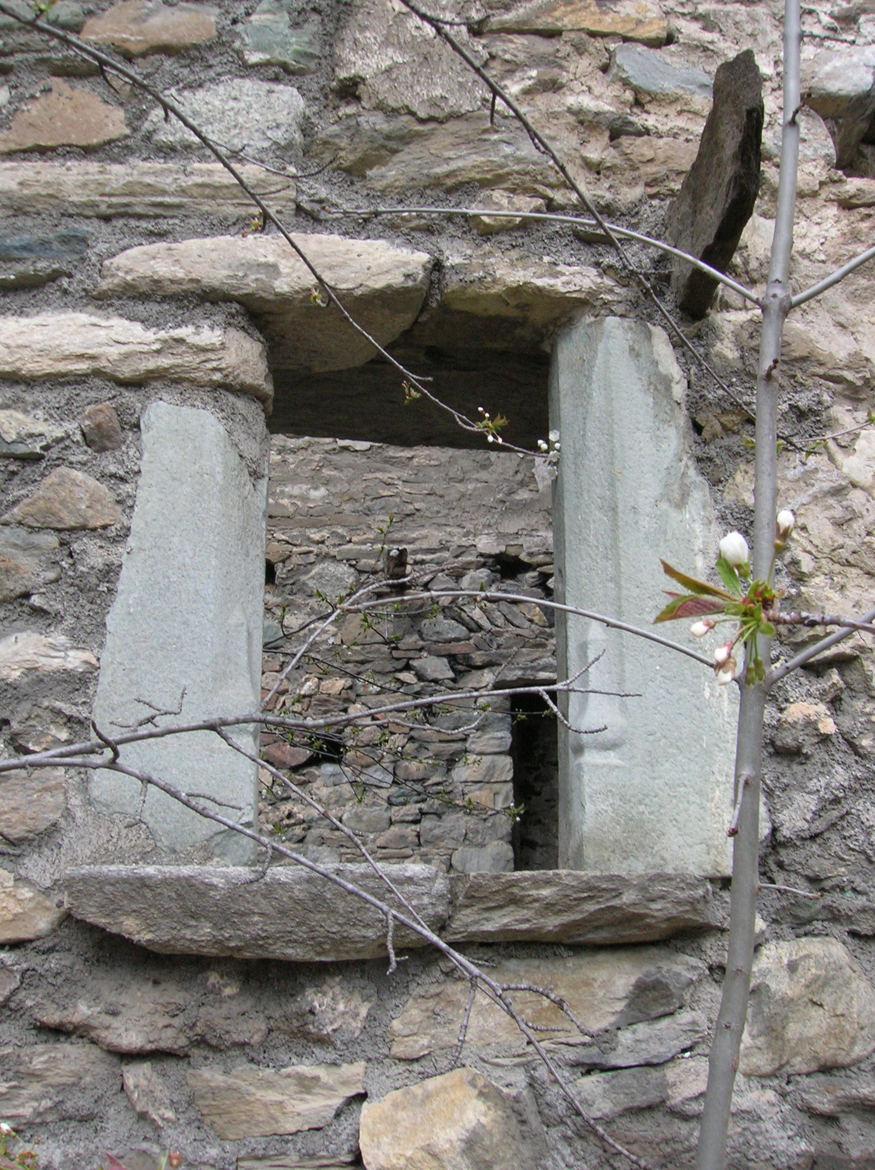 Ruderi del Castello di Cré, Avise, Valle d'Aosta, Italia.